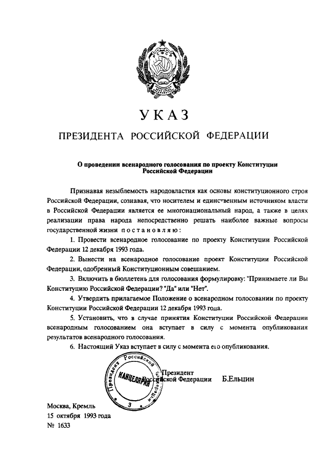 Указ Президента РФ от 15 октября 1993 года № 1633 «О проведении всенародного голосования по проекту Конституции Российской Федерации» // Собрание актов Президента и Правительства РФ. — 1993. — № 42. — Ст. 3995.